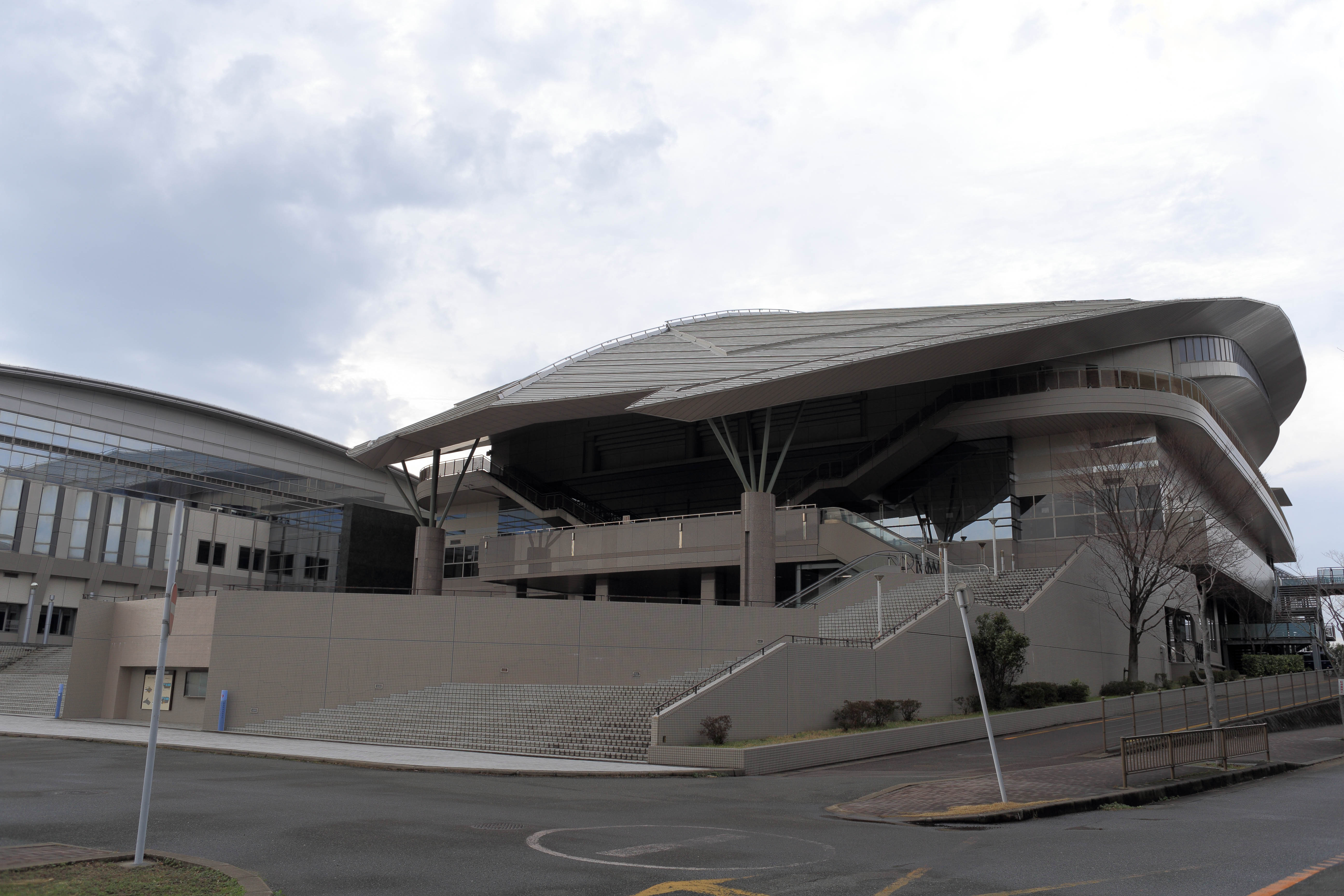 アクシオン福岡 福岡県立スポーツ科学情報センター